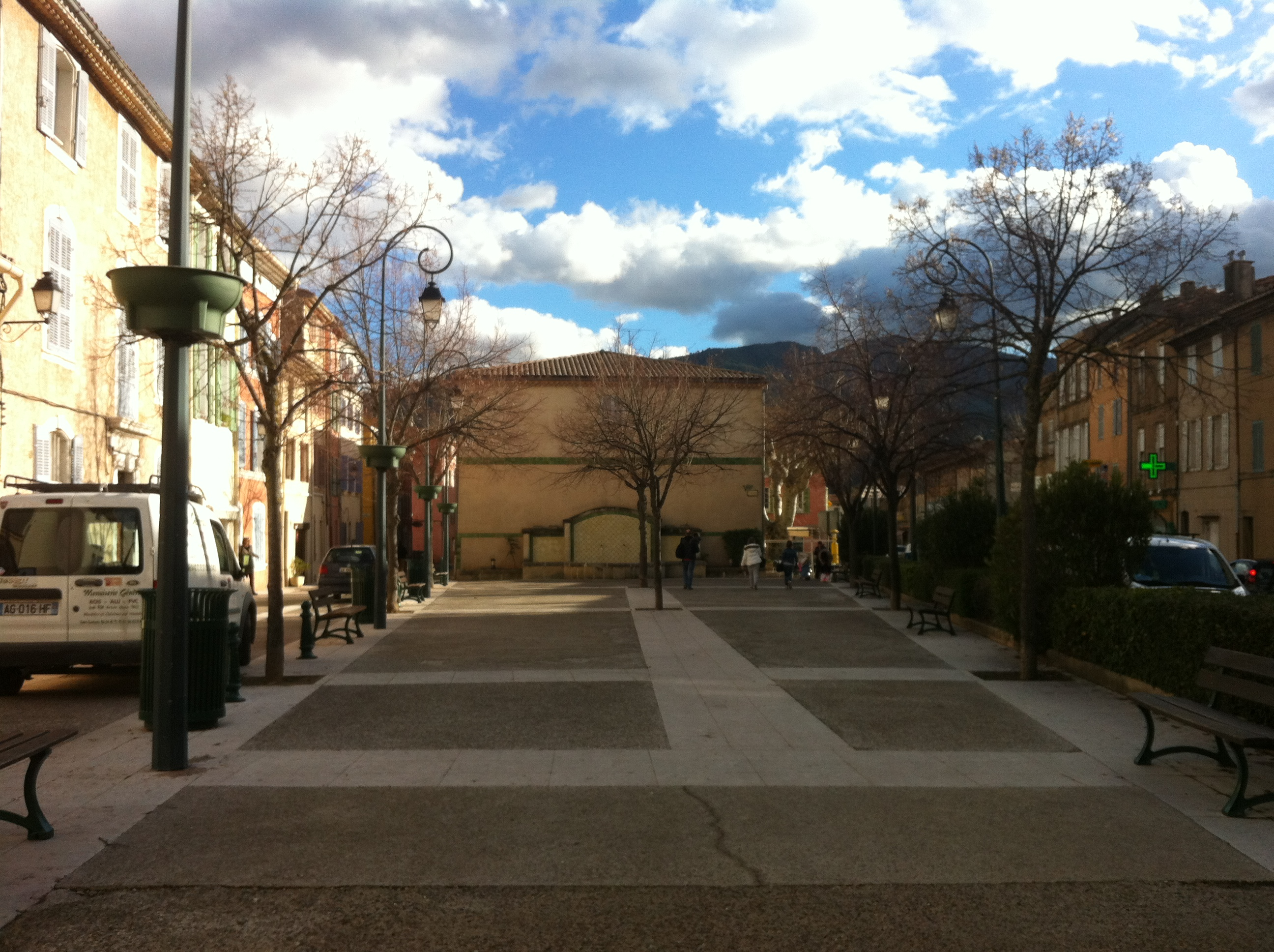 place